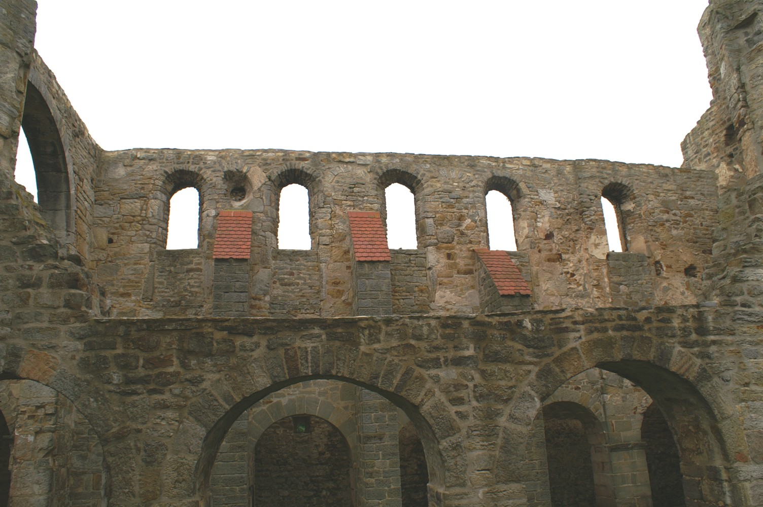 Ruine der Stiftskirche Walbeck (Ohrekreis)